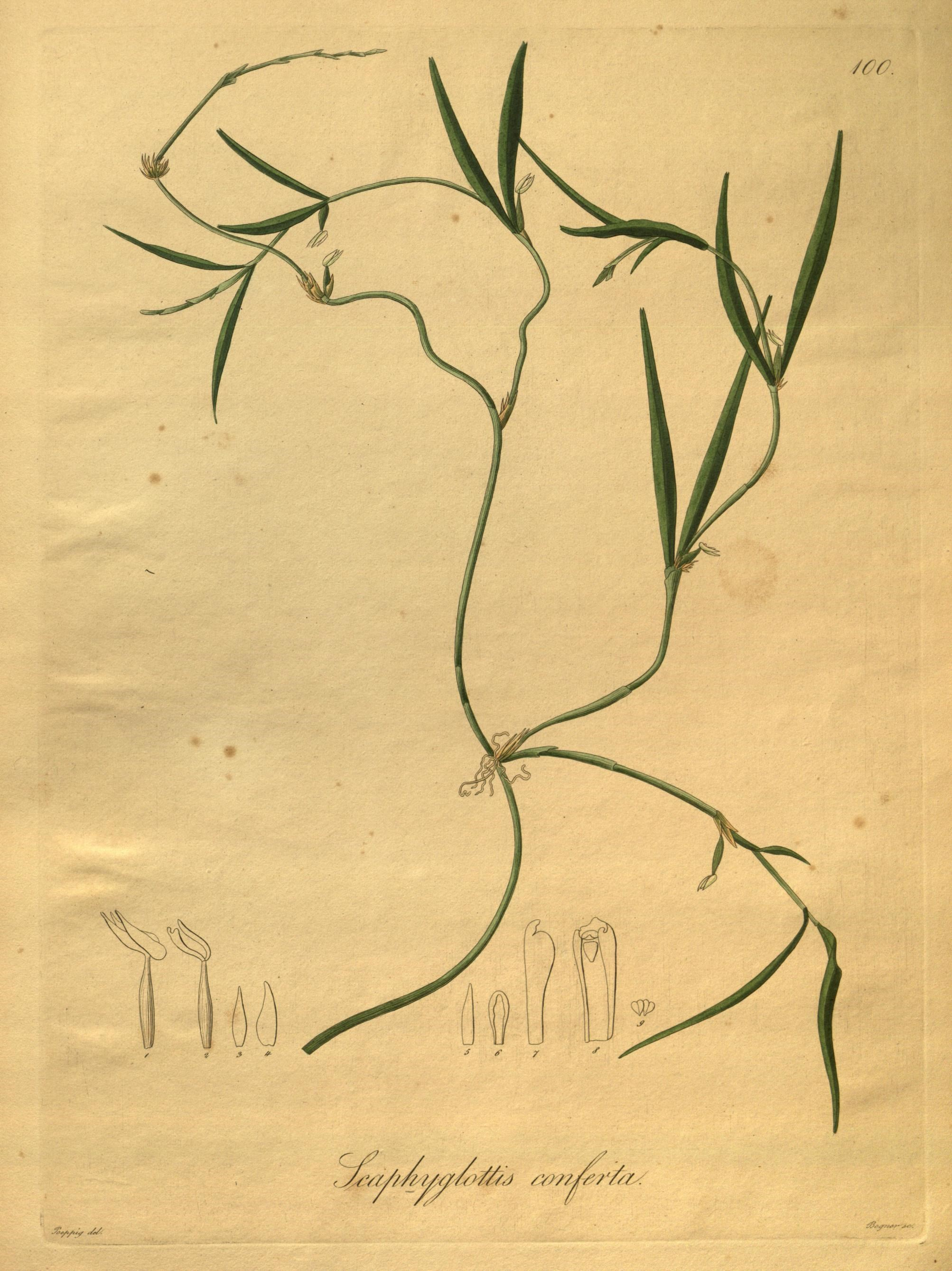 wo. \ ,2/ V/// £W S0£j/l/?..f *&/ vvv*